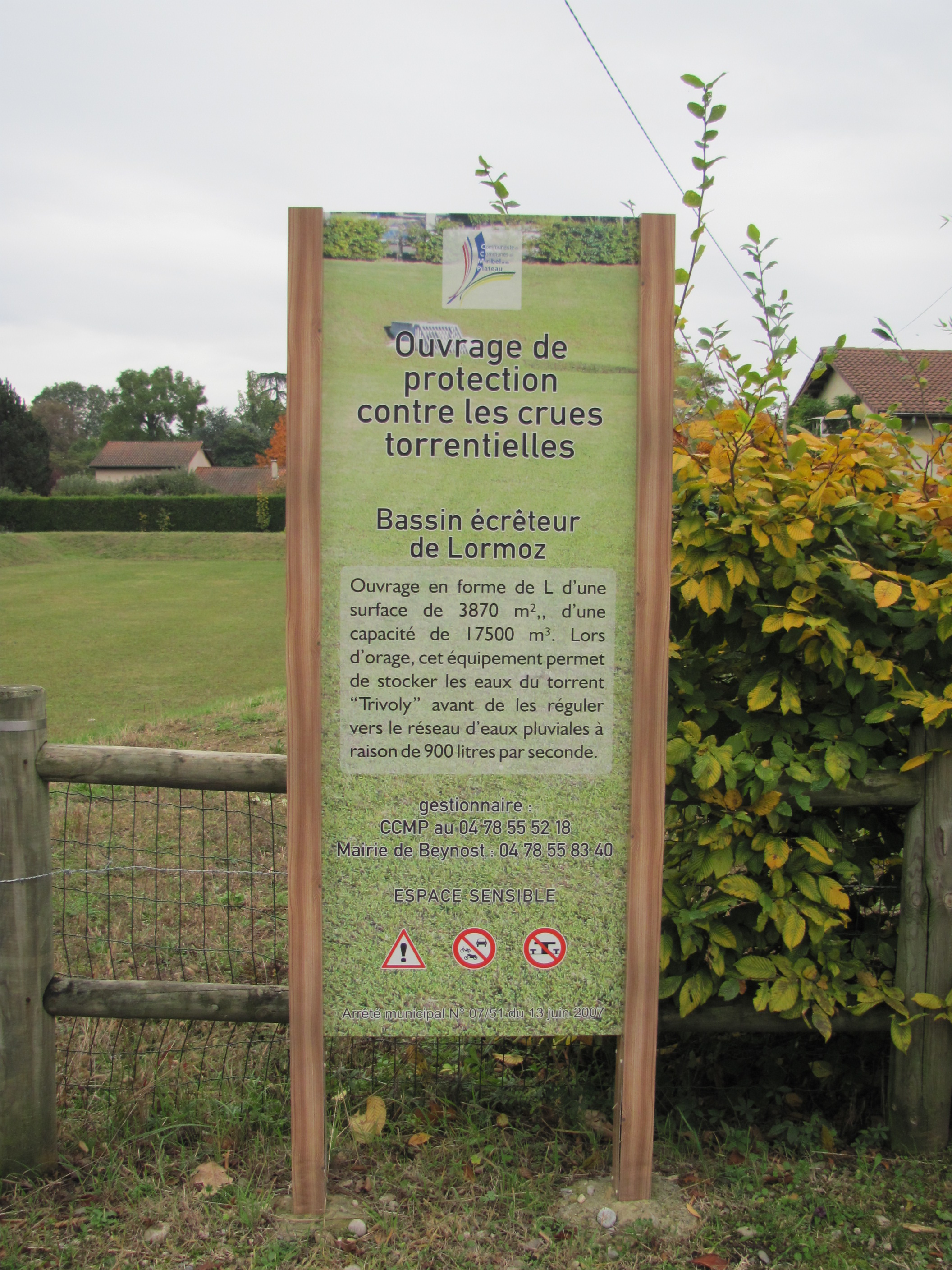 Bassin écrèteur de Lormoz.